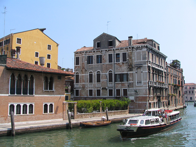 «Малое» вапоретто на канале Каннареджио